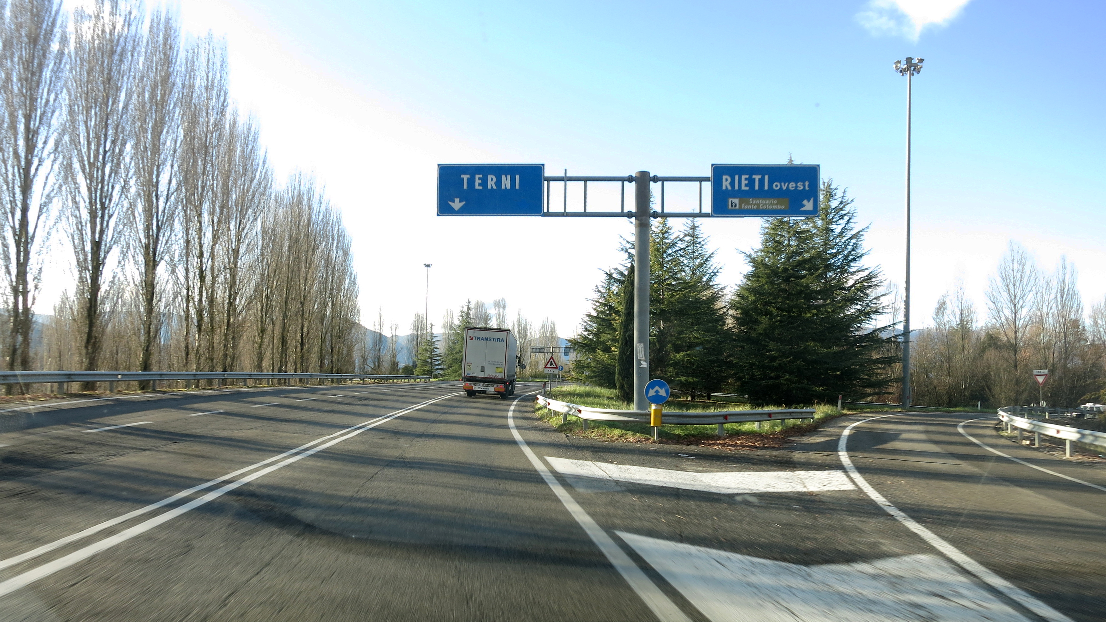 Svincolo "Rieti Ovest" posto sulla strada statale 79 Ternana (superstrada Rieti-Terni) fotografato in direzione Terni